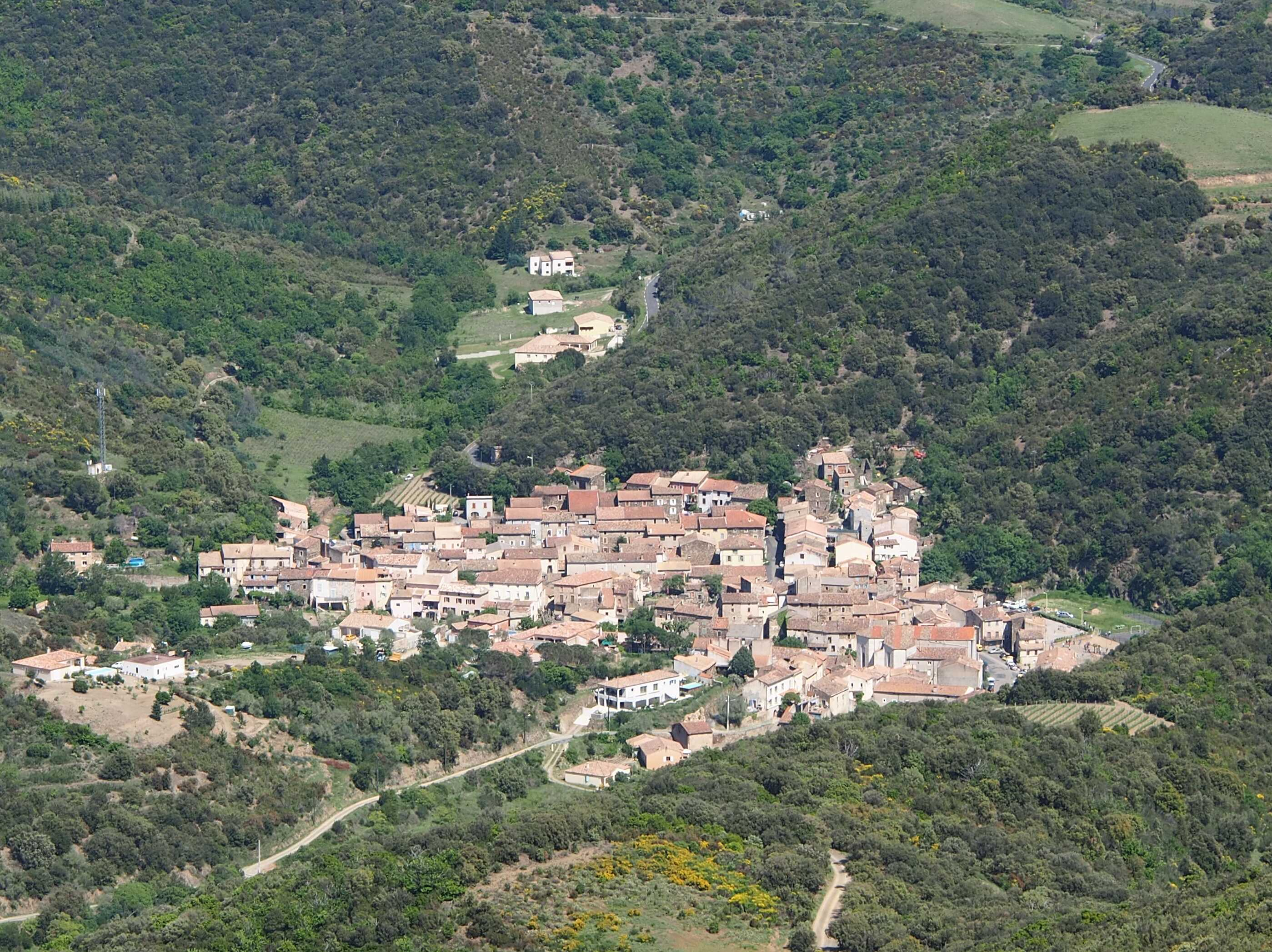 Saint-Nazaire-de-Ladarez vue depuis l'Ermitage